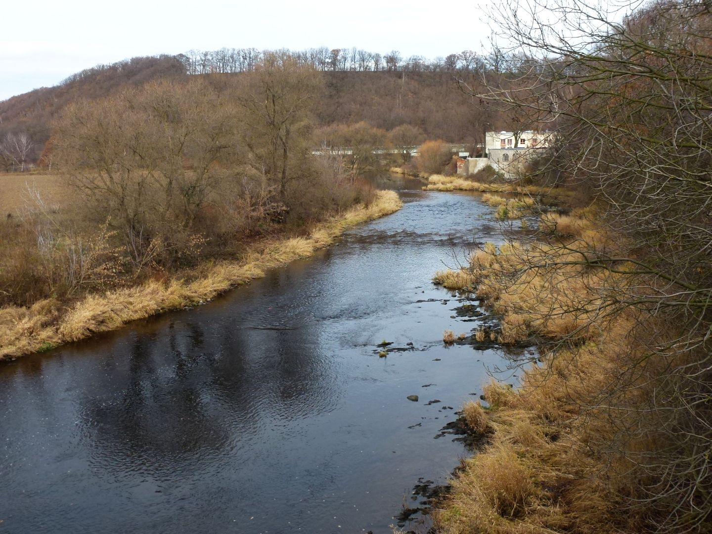 Zschopau direkt vor der Mündung in die Freiberger Mulde